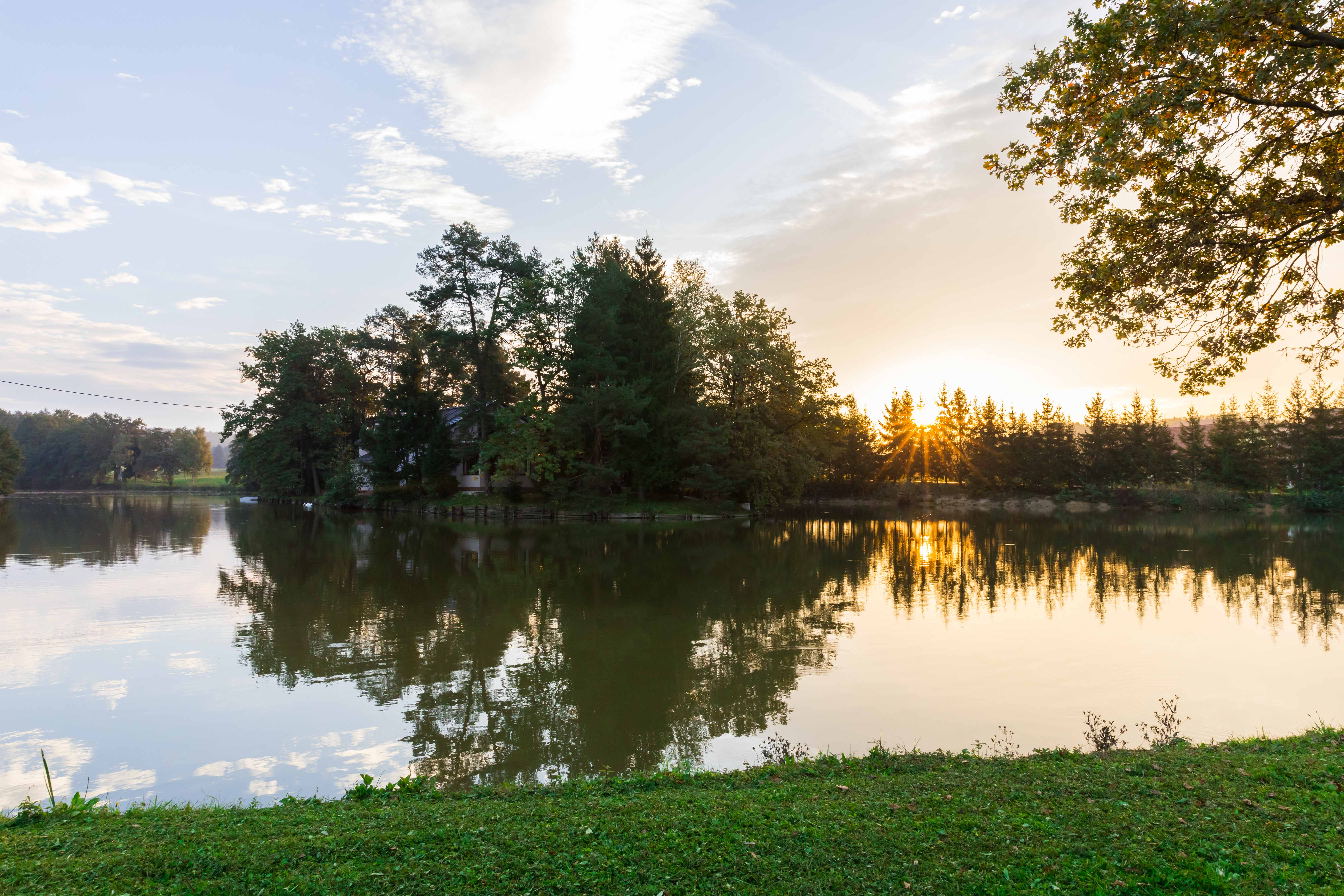 Rajski otok - proseniško